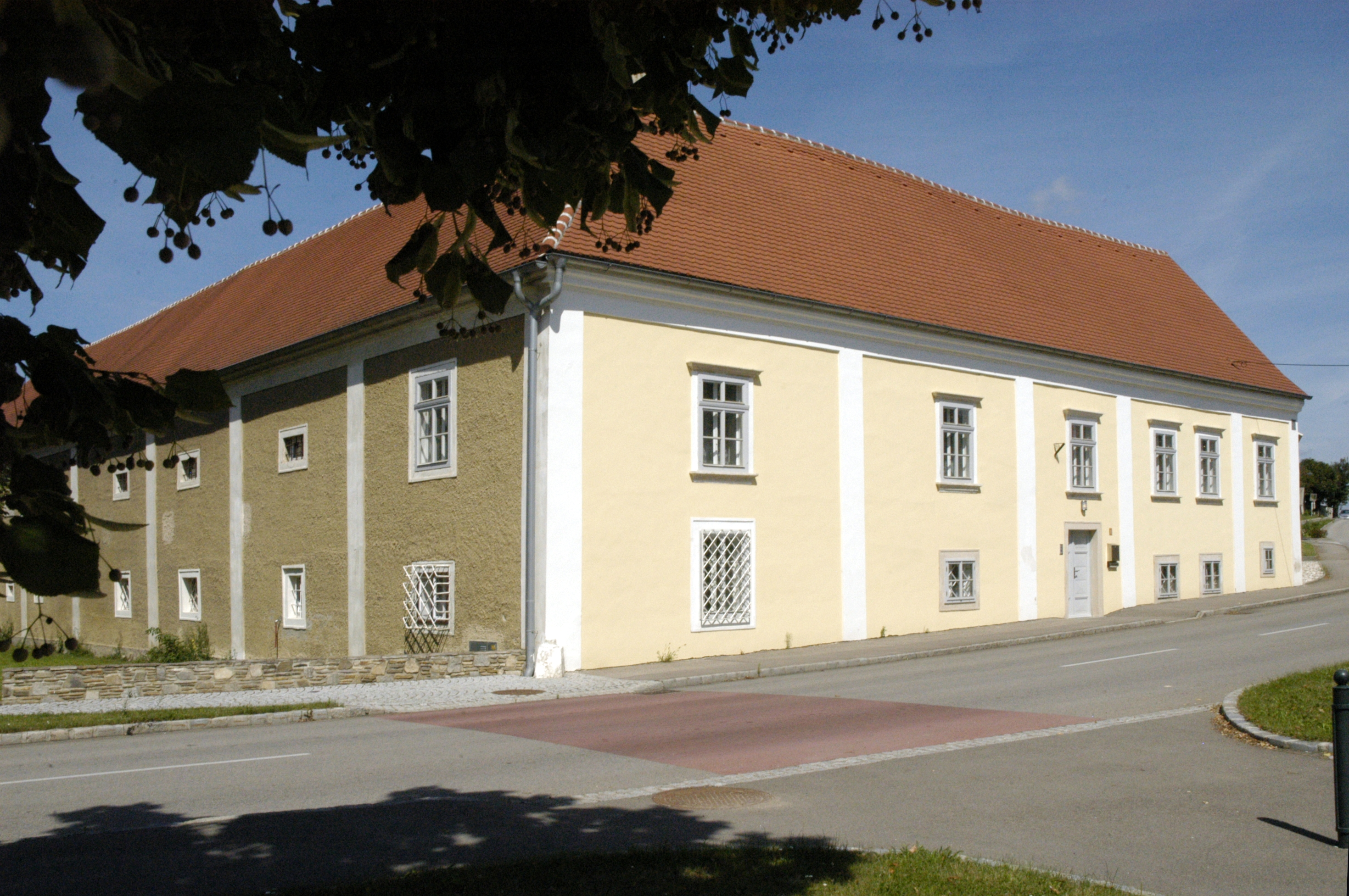 Pfarrhof in Gettsdorf, Gemeinde Ziersdorf